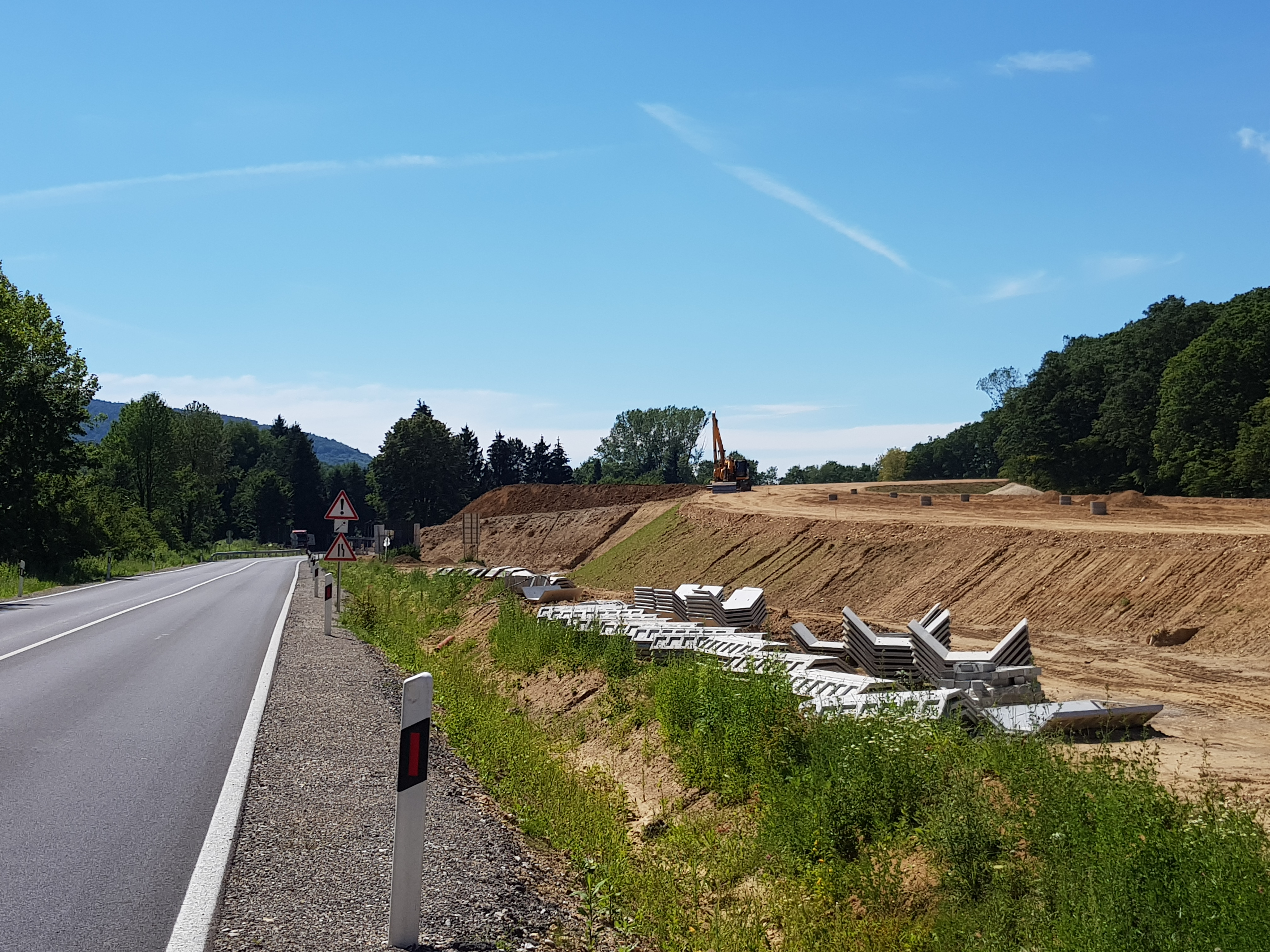 Épülő M87 határmetszés és az ideiglenes 87-es főút